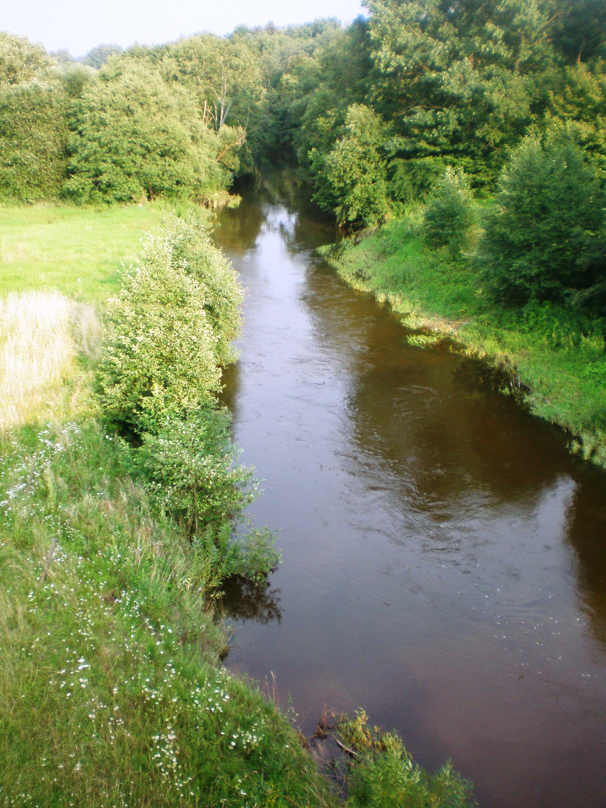 Šaltuona river